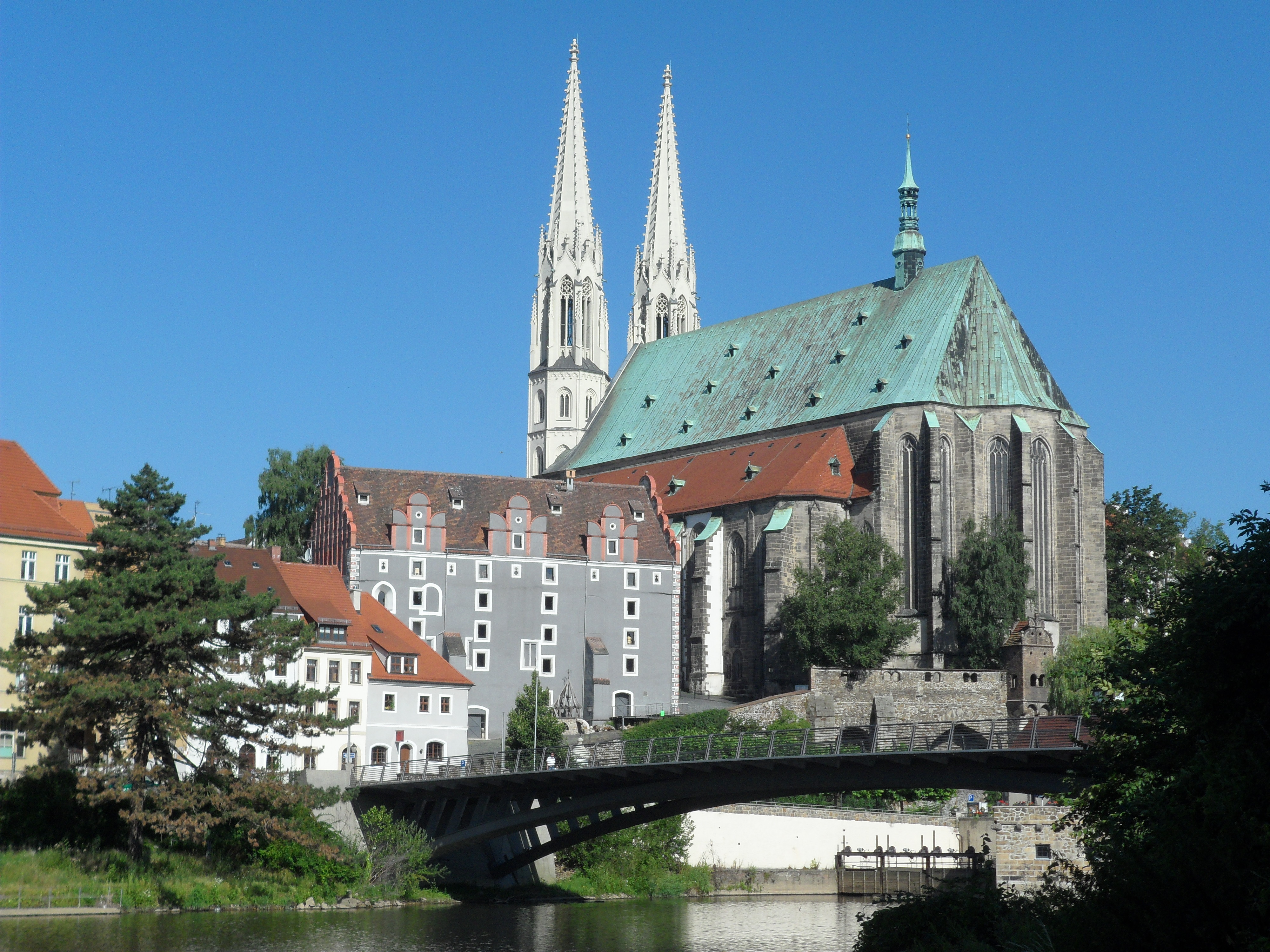 Altstadtbrücke und Peterskirche in Görlitz